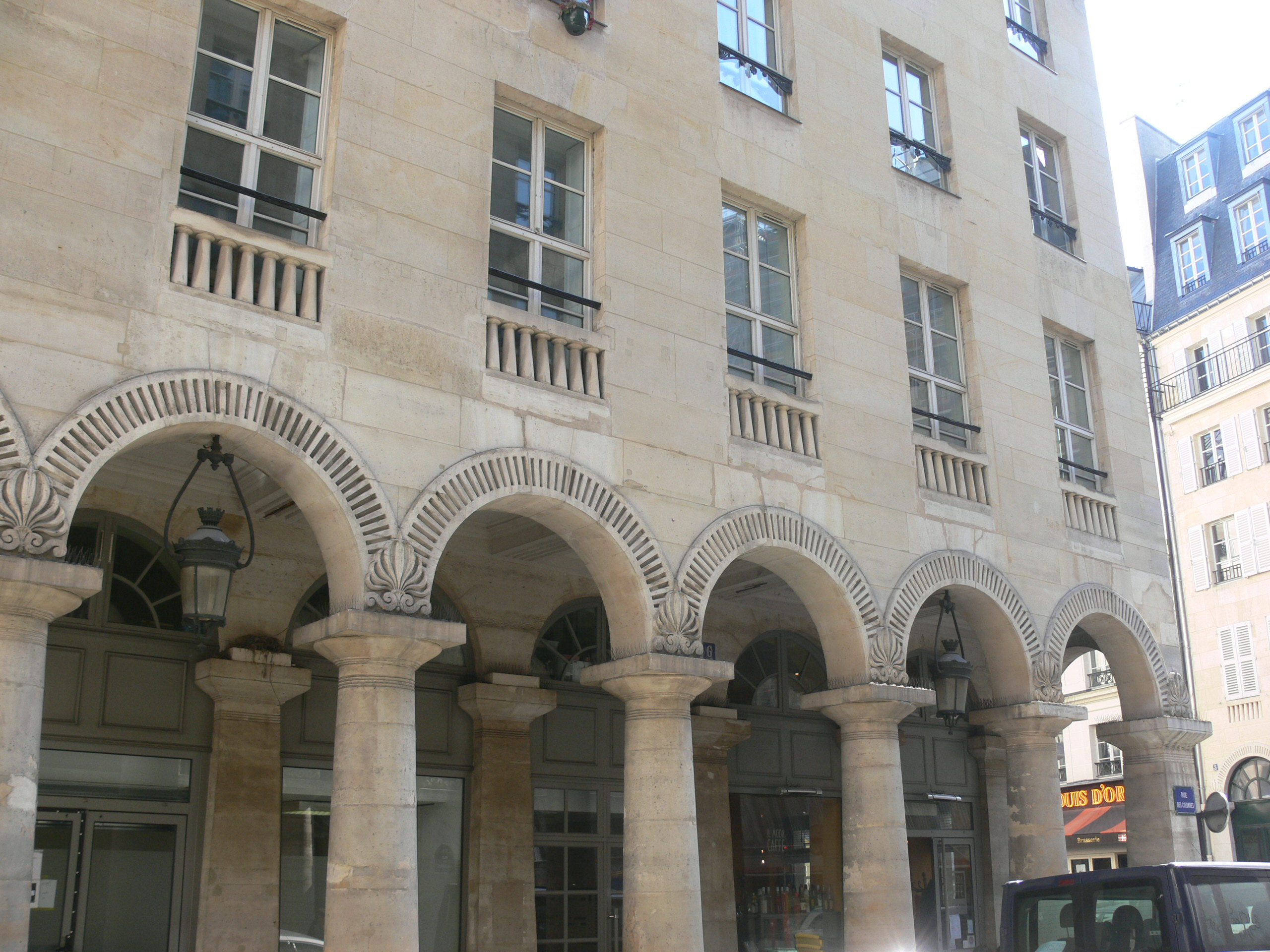 Maison du XVIIIe s. 6 rue des Colonnes à Paris (IIe arr.)